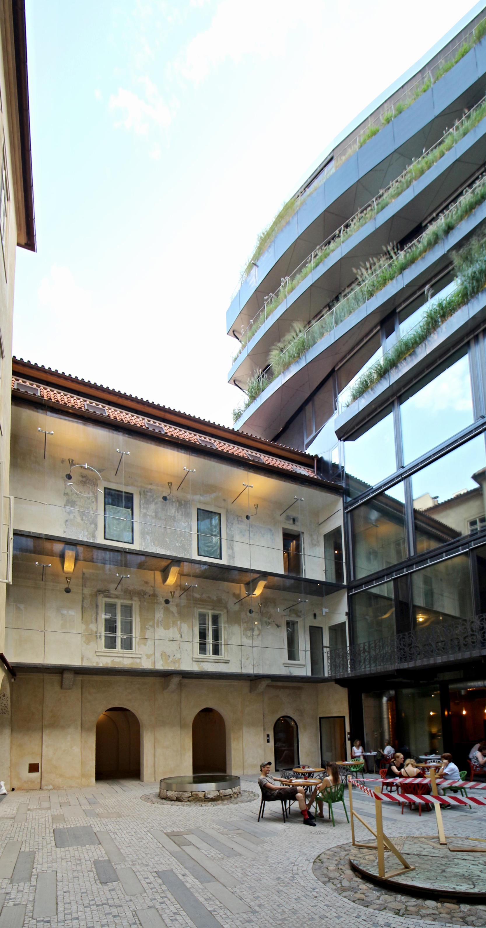 Praha-Národní, Palác DRN